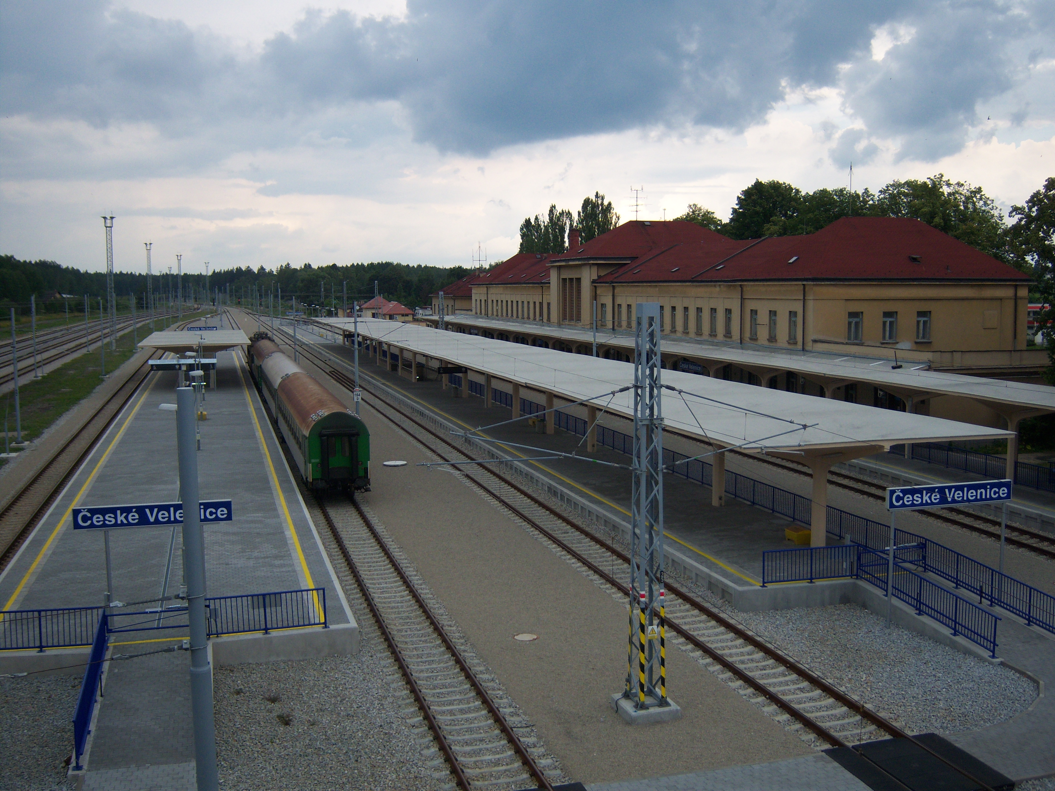 Nádraží České Velenice